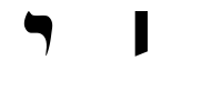 hebrew letter yod